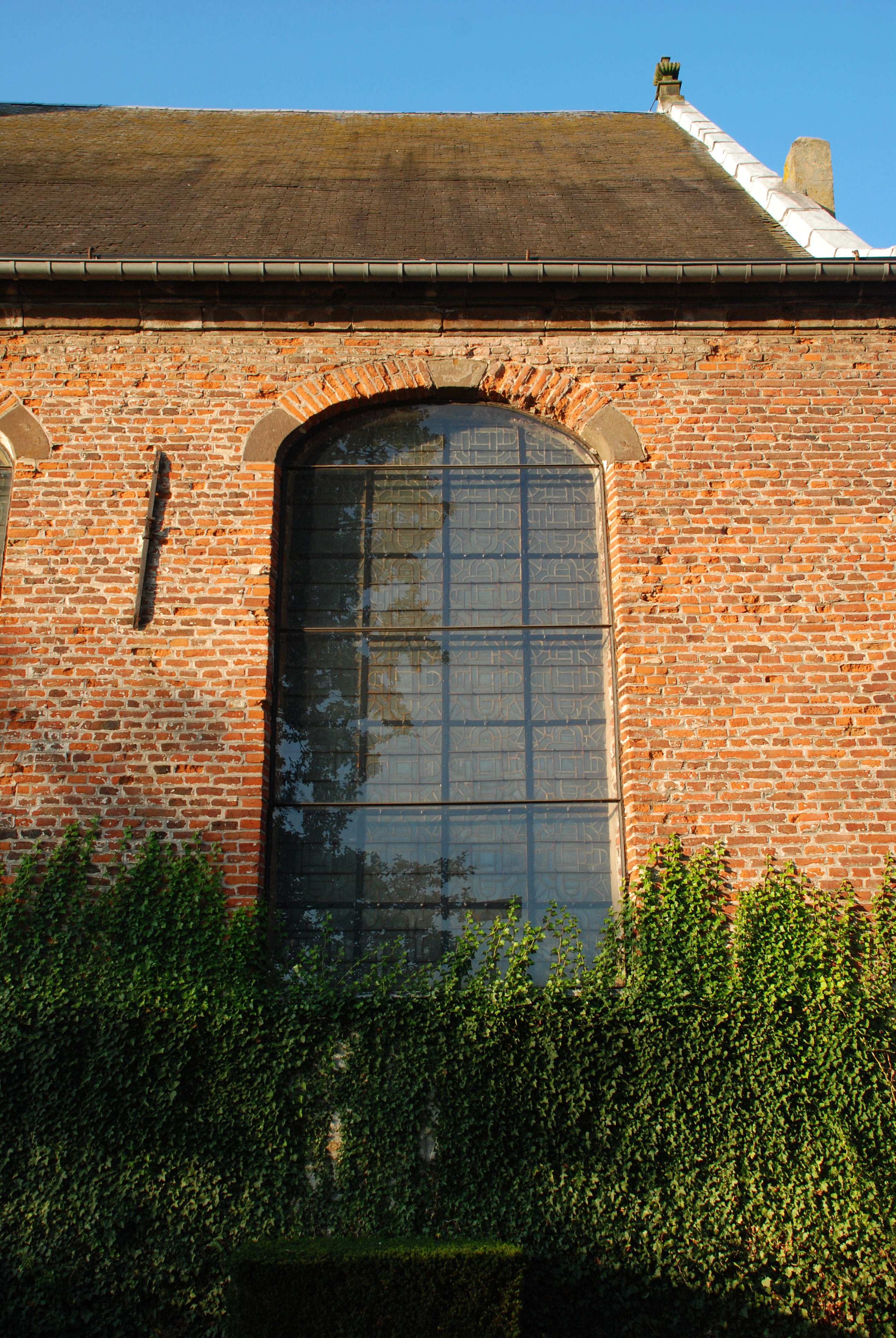 Belgique - Brabant Wallon - Lasne - Église Saint-Étienne d'Ohain